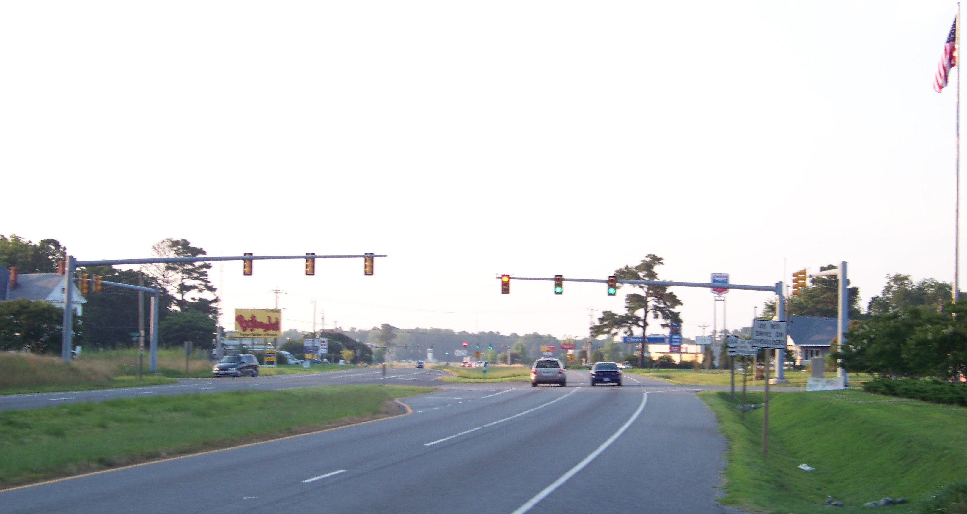 Exmore, Virginia